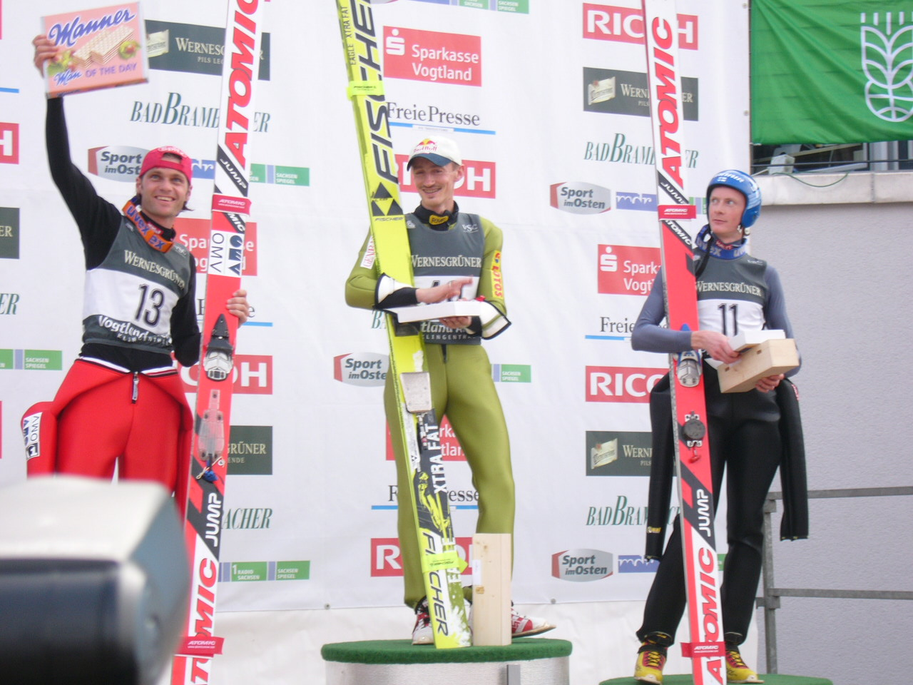 Sommer-Grand Prix in der Vogtlandarena am Schwarzberg in Klingenthal/Sa. 2007